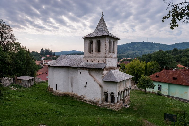 Biserica "Sf. Voievozi" a Mănăstirii Baia de Aramă - vedere nord-vest 01